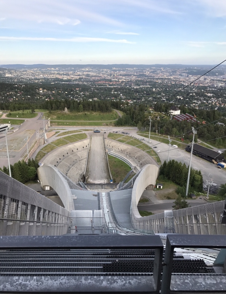 Udsikt fra den nye hopbakke i Holmenkollen.